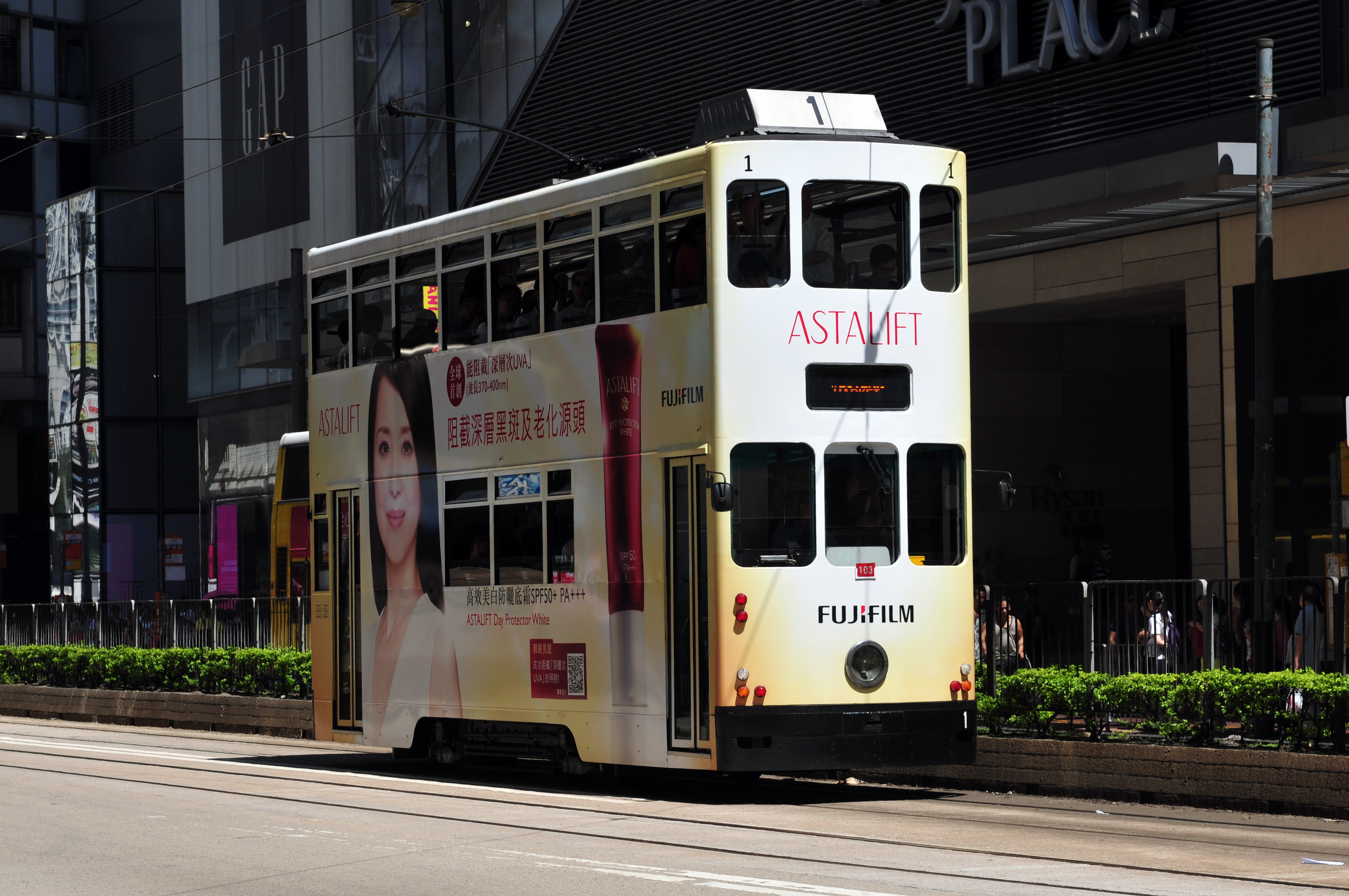 Wikimania 2013 Hongkong